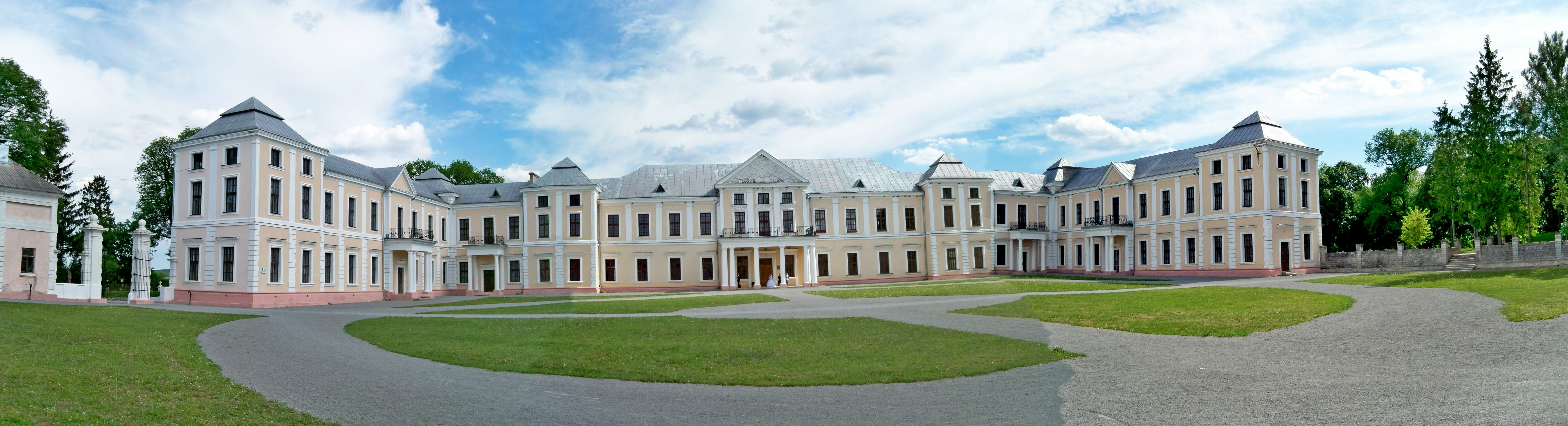 «Вишнівецький парк», Збаразький район, смт Вишнівець